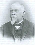 Portrét – Gustav Karl Laube (1839 - 1923), Český geolog a paleontolog .